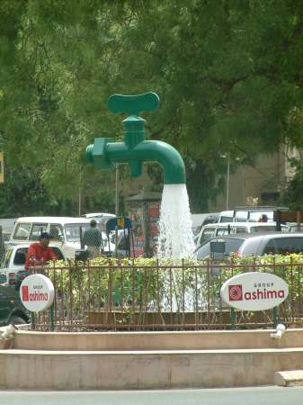 Flying Tap (dt. fliegender Wasserhahn)-Brunnen in Ahmedabad, Indien.